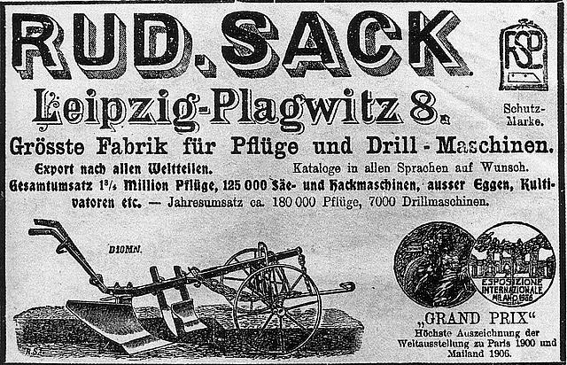 Altes Inserat der Rudolph Sack KG aus Leipzig-Plagwitz (Kürzel/Schutzmarke RSLP)